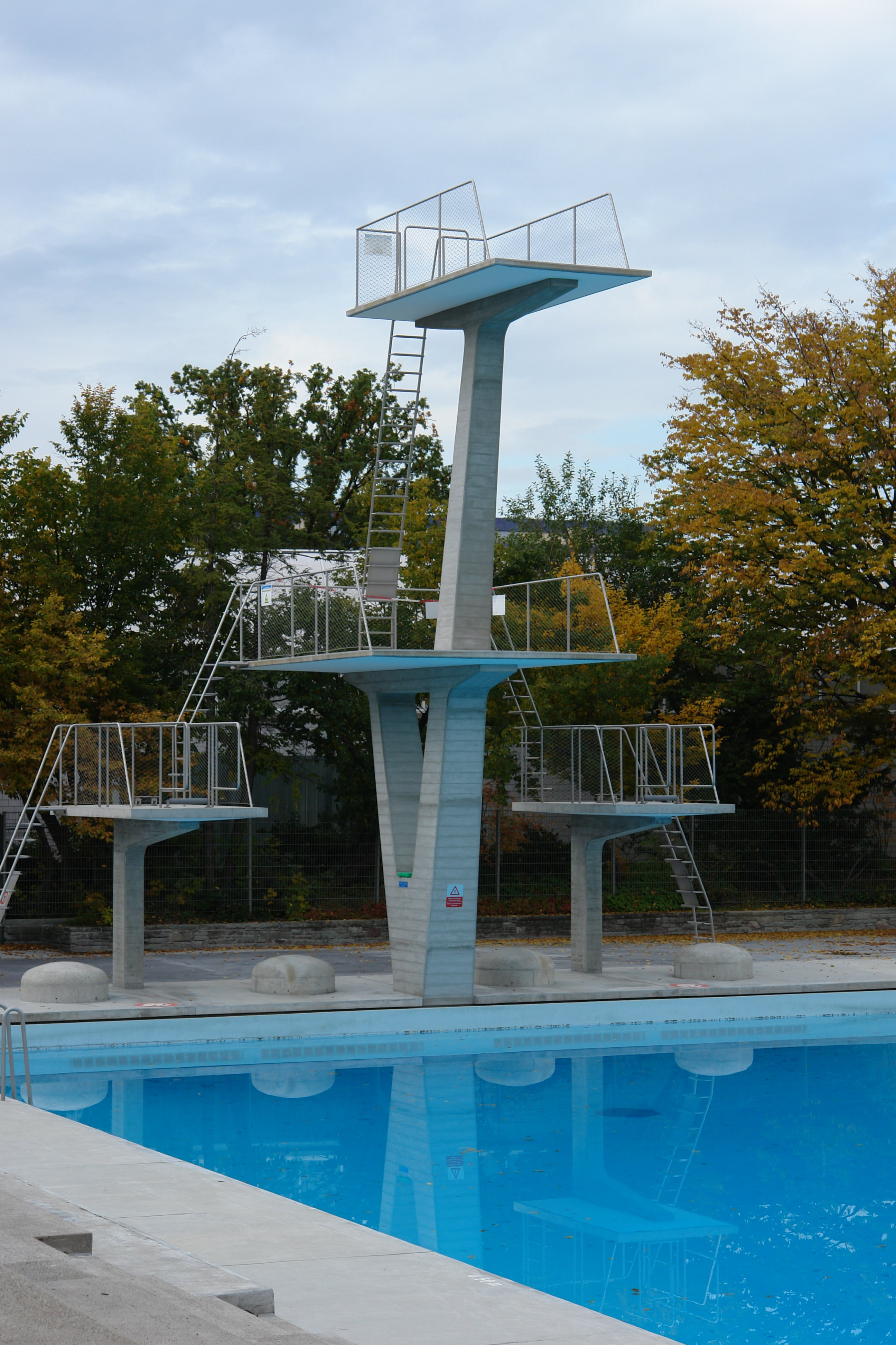 Freibad Letzigraben, Sprungturm, Wettbewerb 1943, errichtet 1947, Architekt: Max Frisch